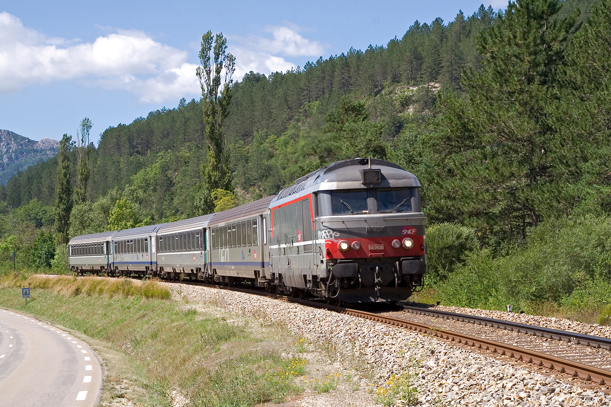 TER 17357 entre Lesches-Beaumont et Beaurières (France-Drôme) - Ligne de Livron à Aspres-sur-Buëch - Commune de Lesches-en-Diois